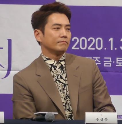 1월 3일 오후 서울시 강남구 논현동 임피리얼 팰리스 서울에서 채널A 새 금토드라마 '터치' 제작발표회가 열려 배우 주상욱 김보라 이태환 한다감 변정수가 참석해 포토타임을 갖고 있다.